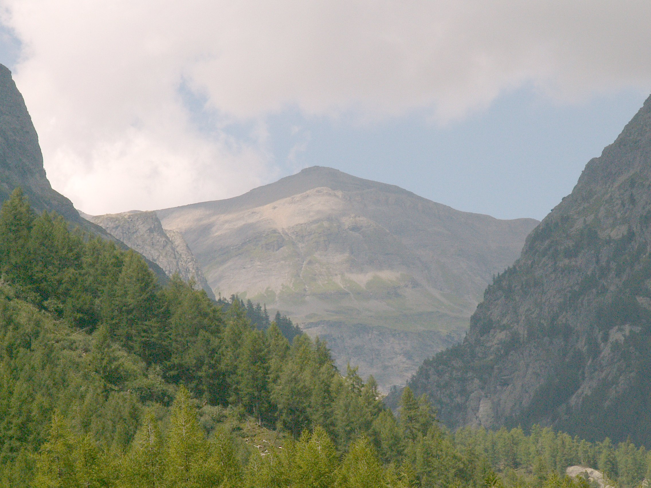 Mont Buet; BAUVILLAIN Grégoire Aout 2005